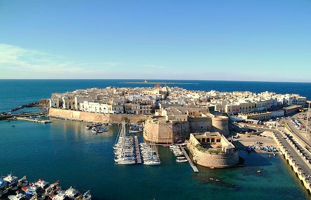 Città Vecchia di Gallipoli, Lecce, Puglia